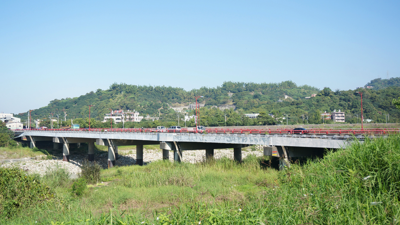 太平一江橋